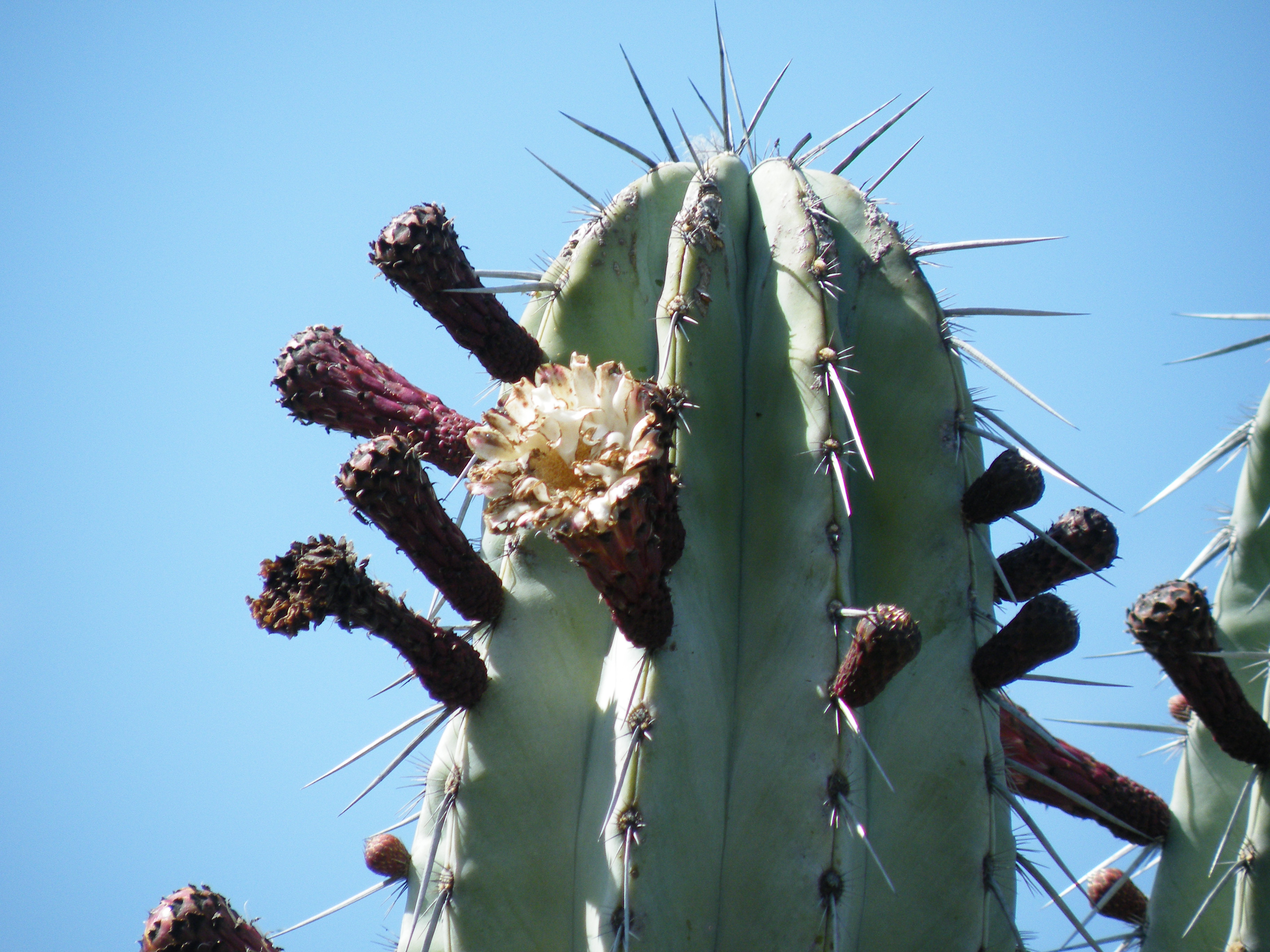 Near San Gabriel Chilac, Puebla